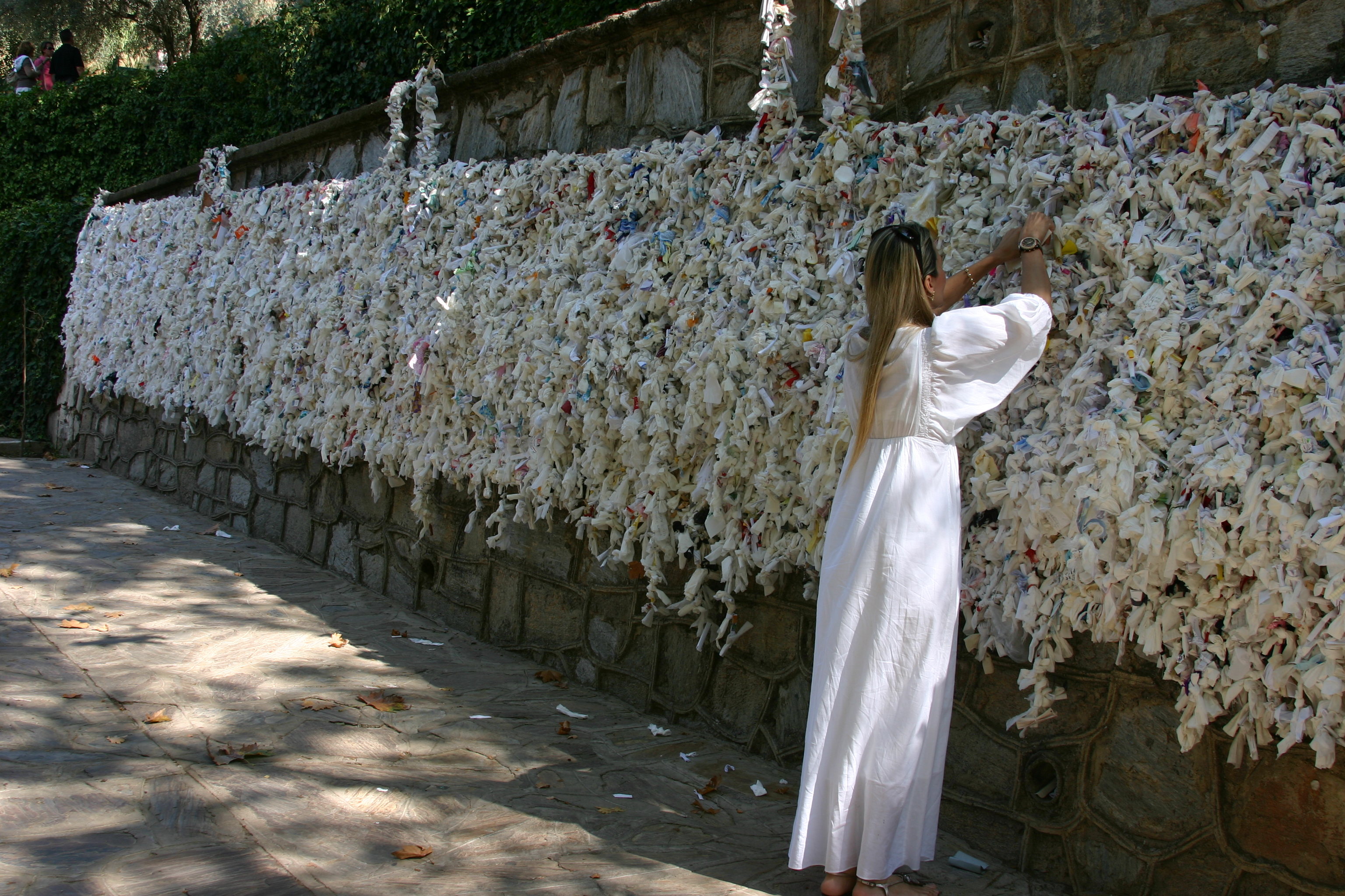 Muro dos pedidos na casa da Virgem Maria em Éfeso.